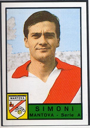 Luigi Simoni che indossa la maglia del Mantova